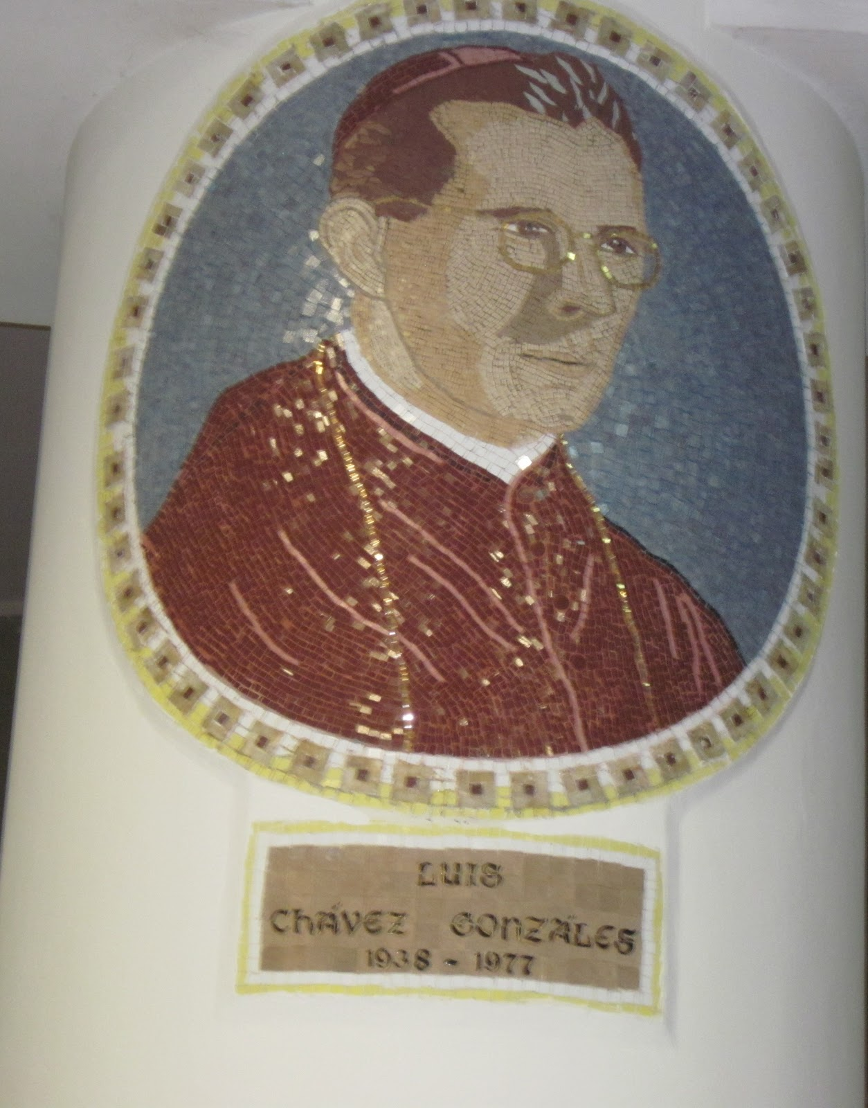 Monseñor Luis Chávez y González